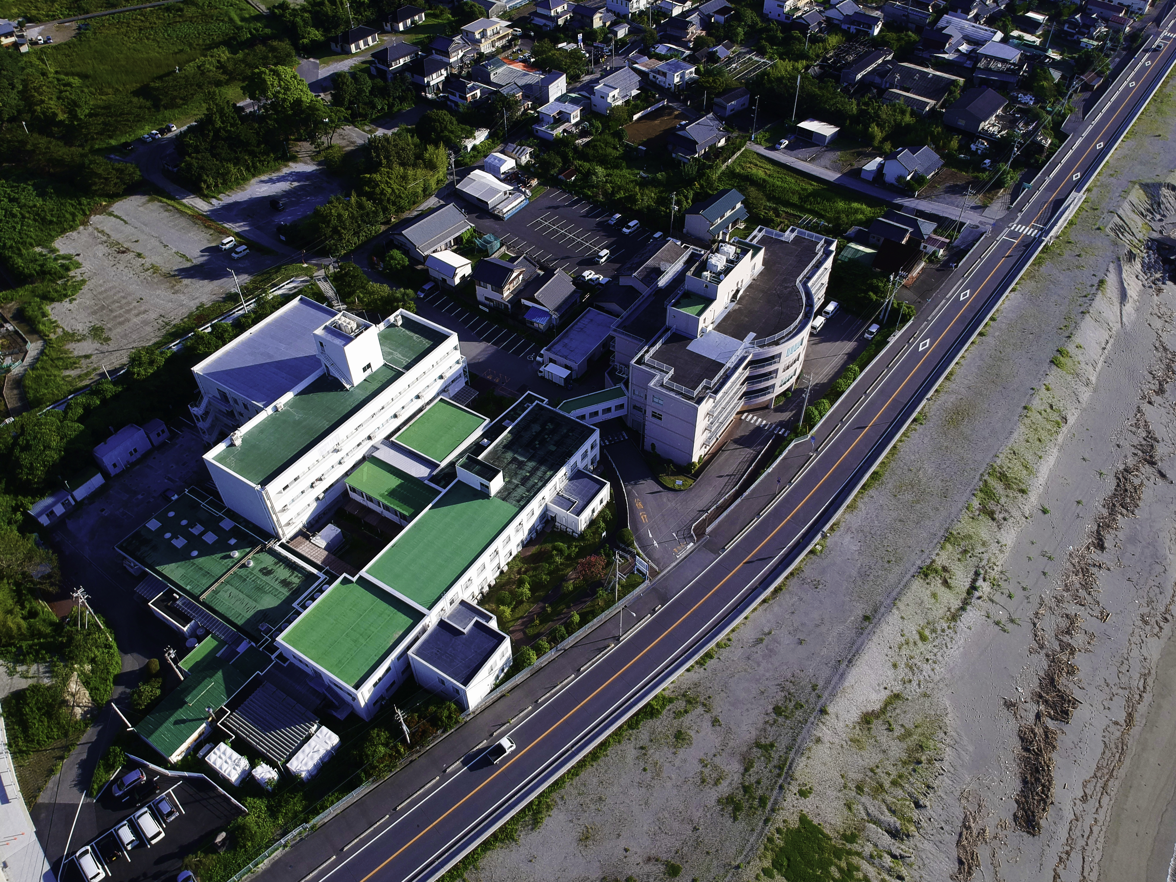 土佐市新居にある白菊園病院